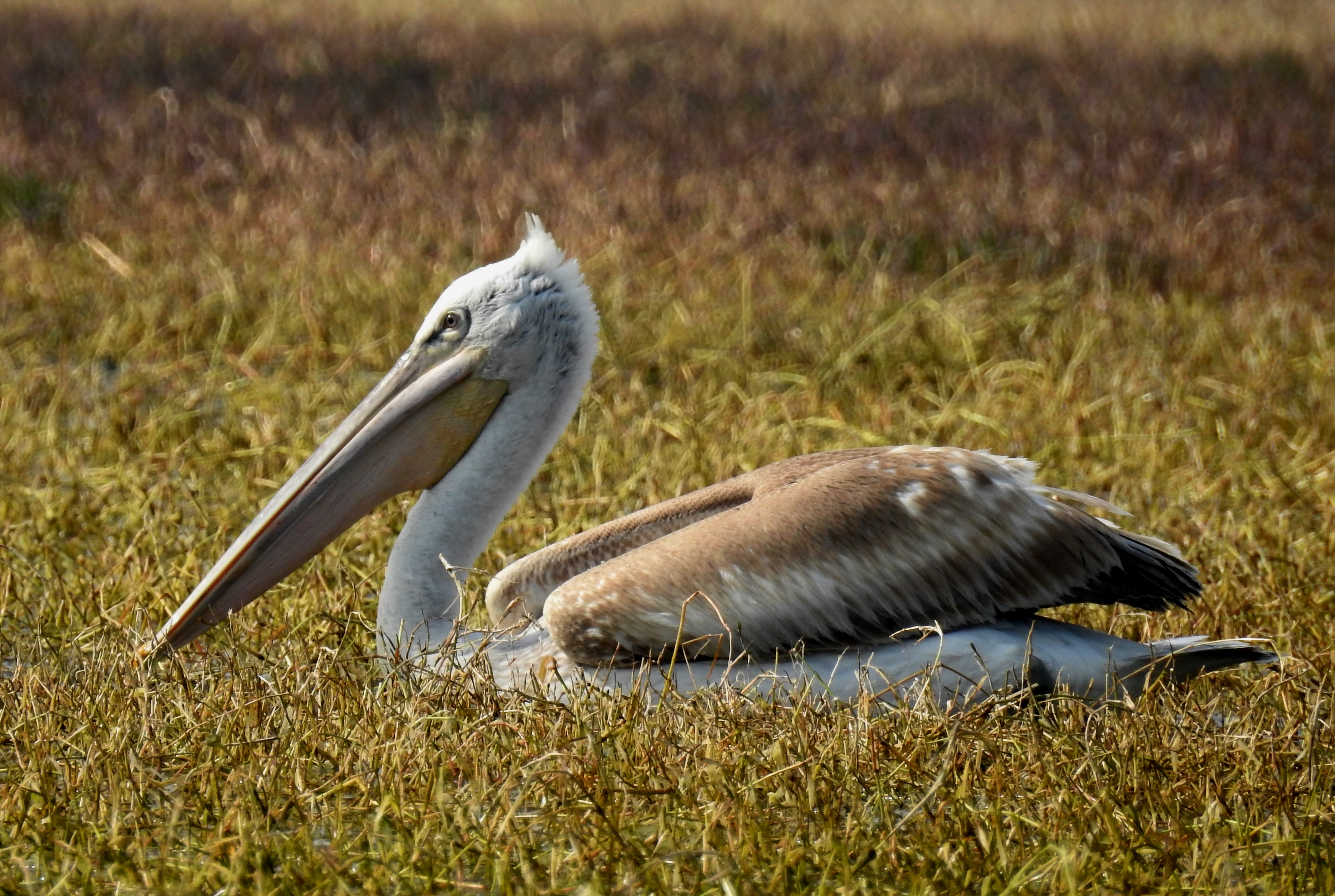 मराठी नाव: झोळीवाला